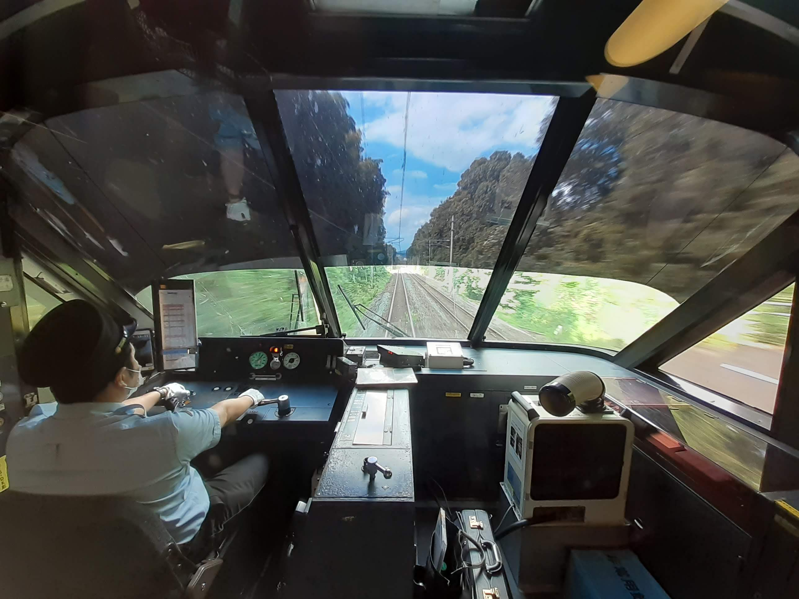 JR九州783系電車 前面展望